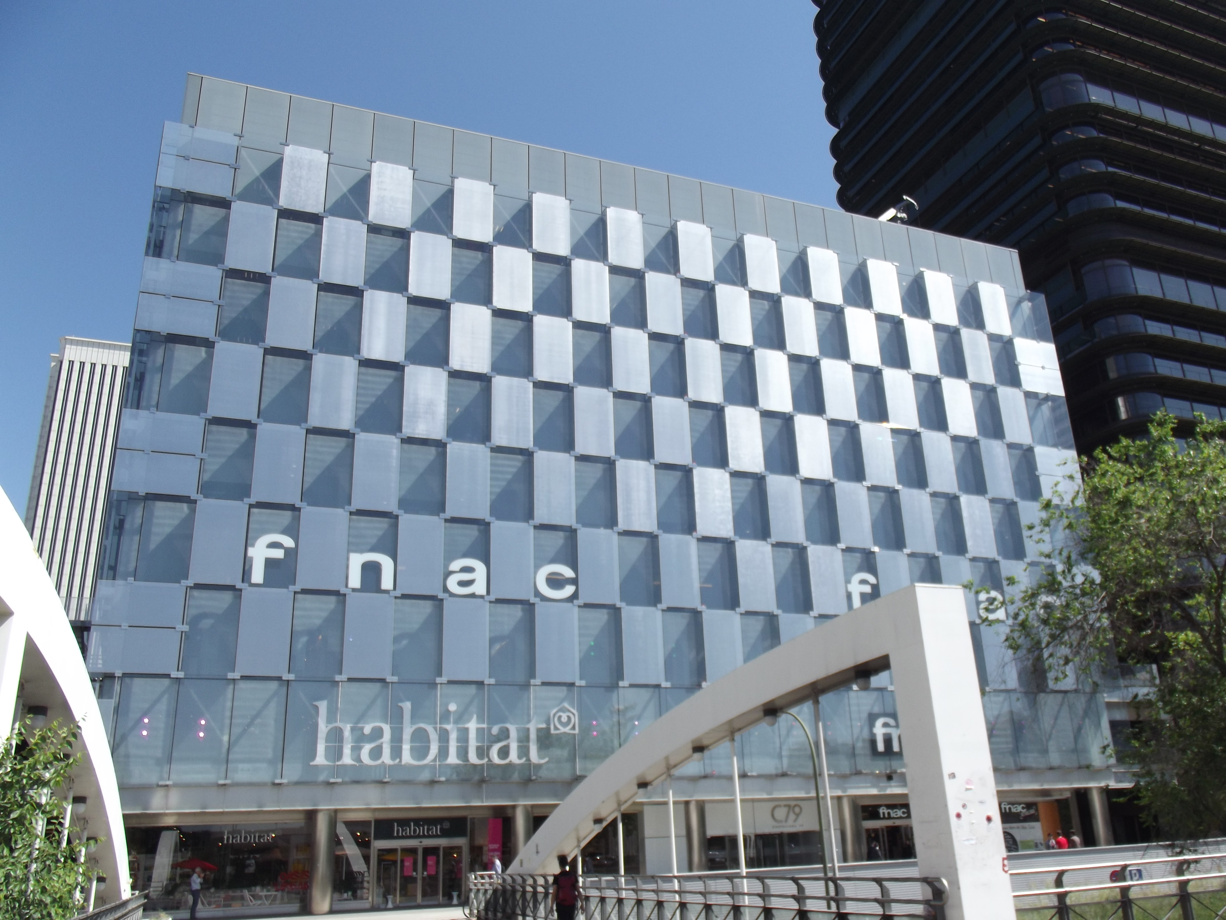 Edificio de FNAC Castellana, Nuevos Ministerios, Madrid.